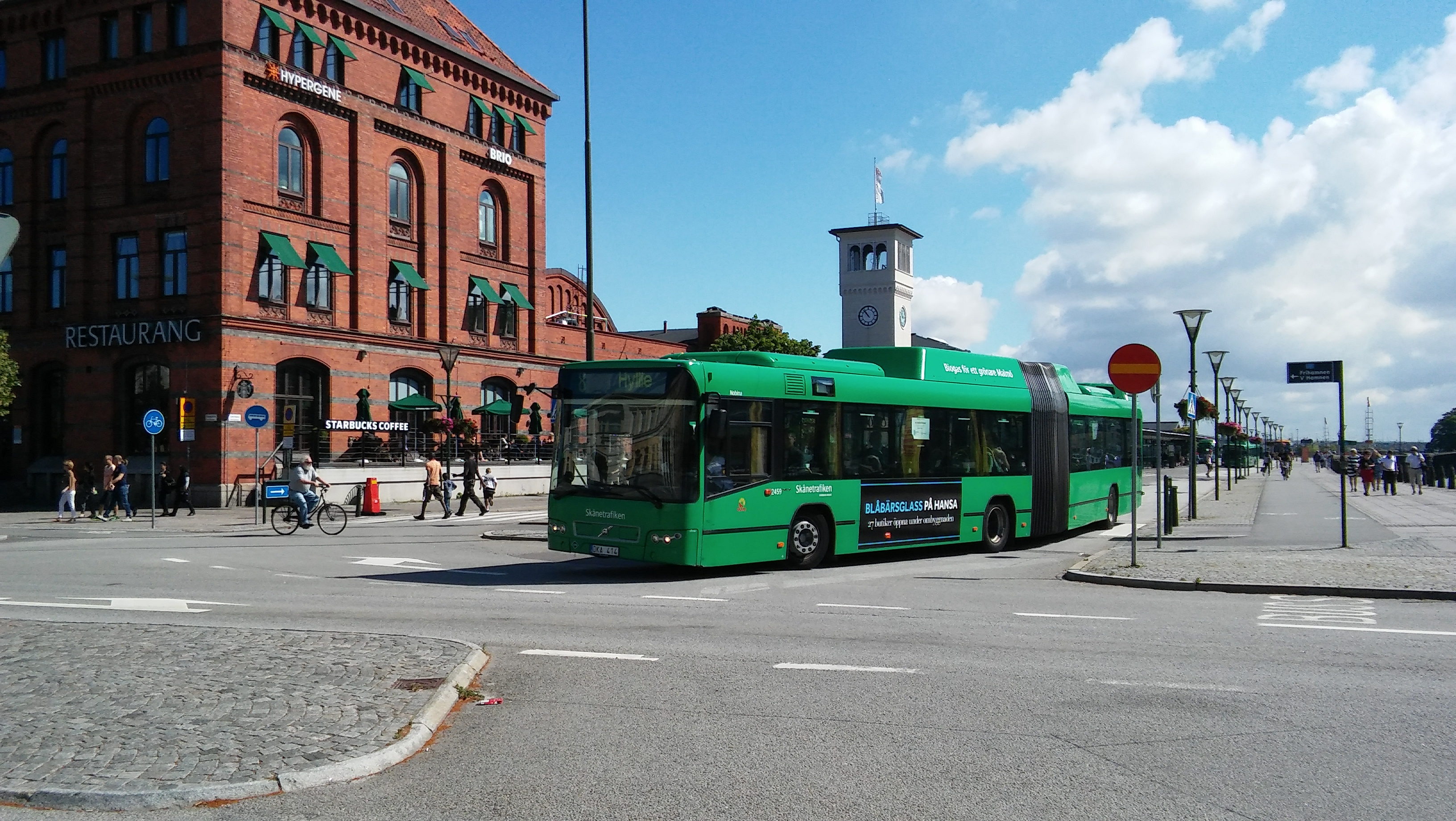 Volvo 7700 A à la gare centrale de Malmö en 2016